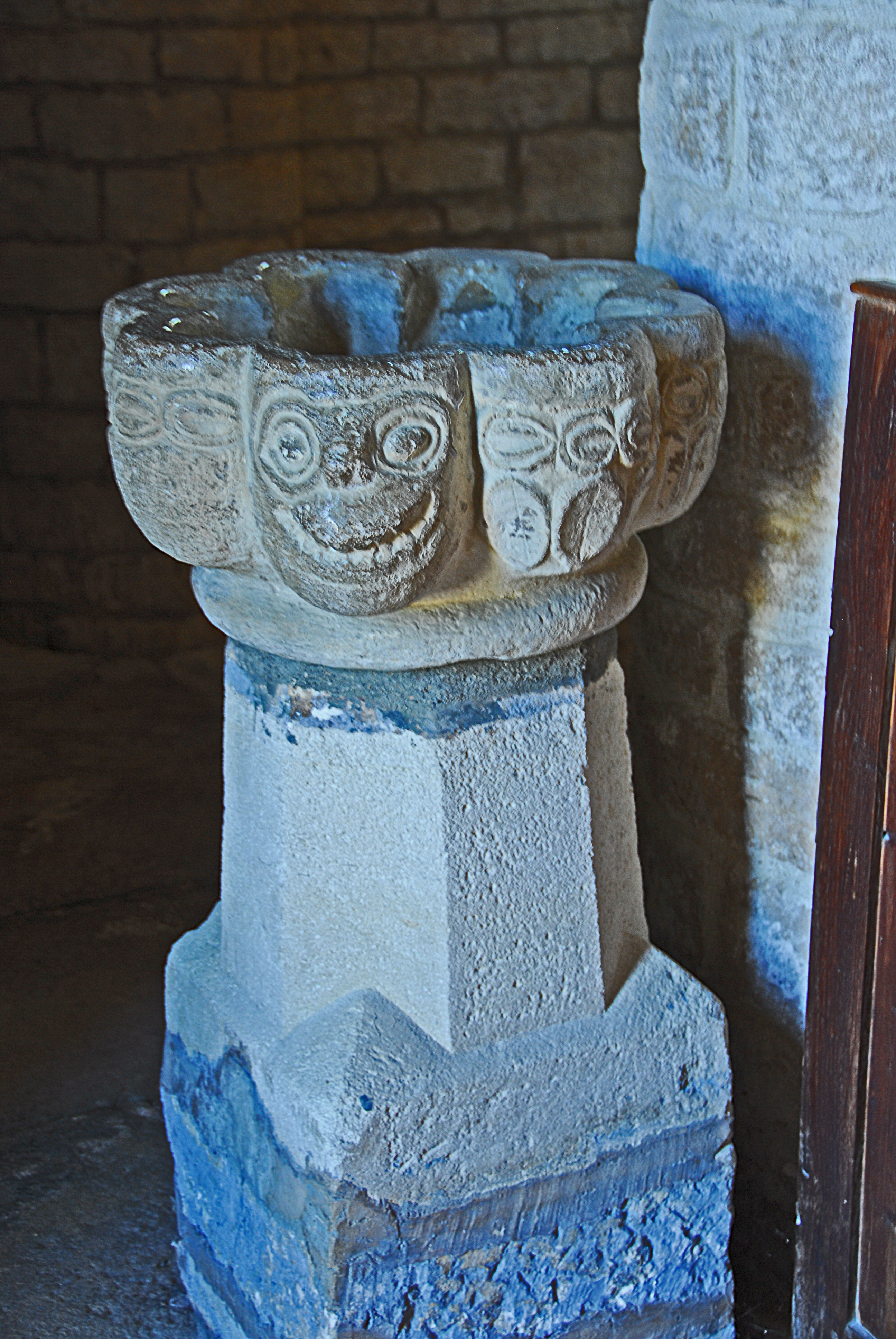 St-Bathélémy, Farges, Taufbecken